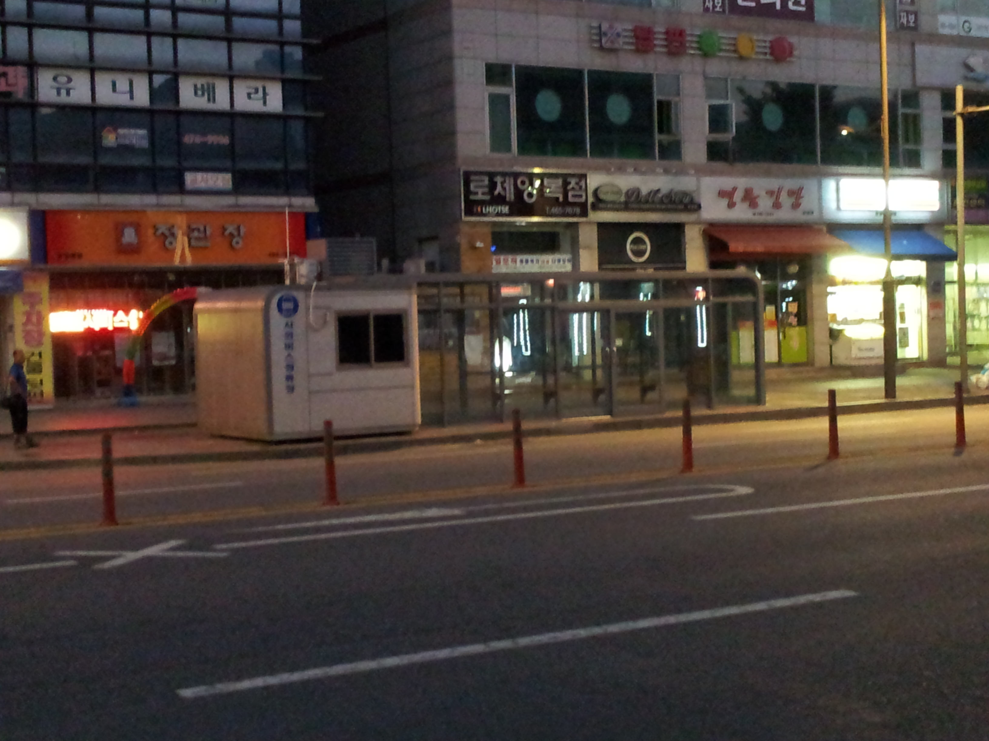 안양킹덤웨딩홀시외버스정류장 매표소